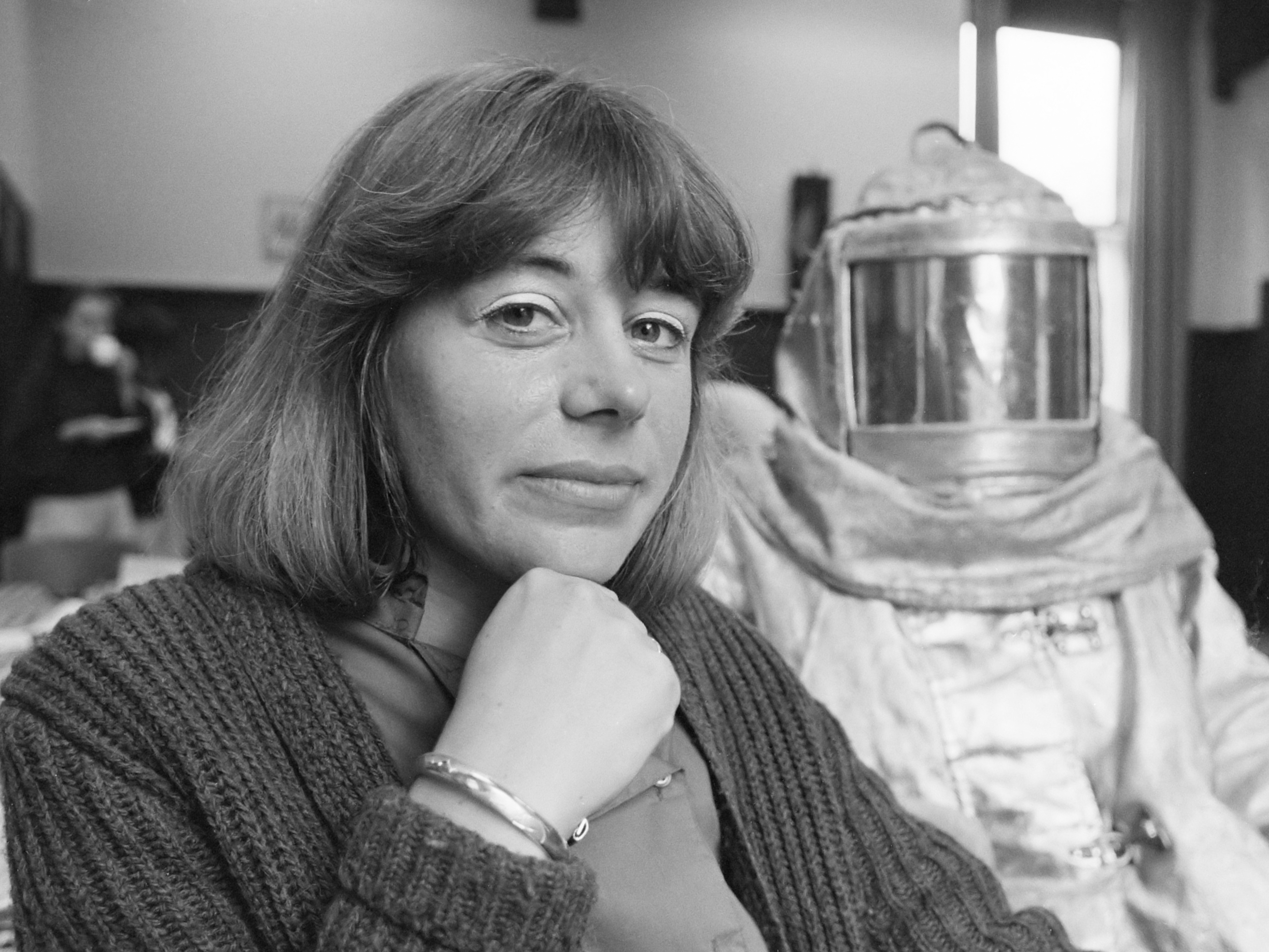 Els Groen van boekje "Straling, mag het ietsje meer zijn?" 6 oktober 1987